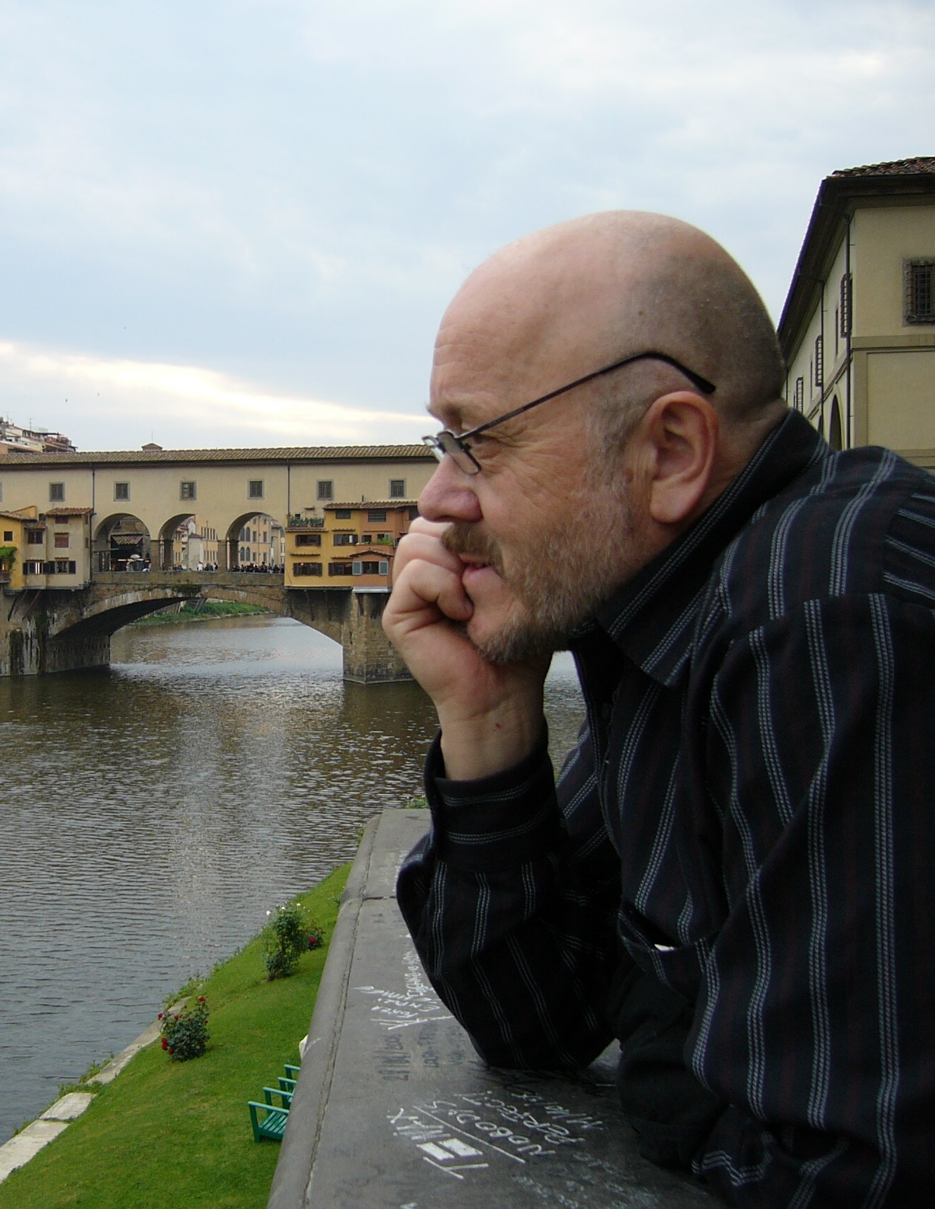 Harald Sæther